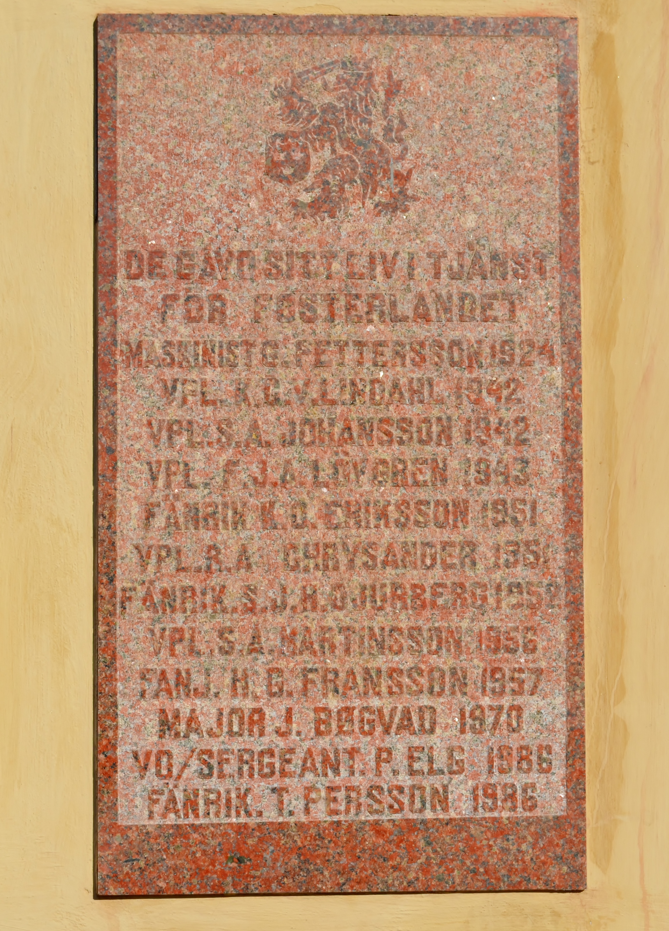 Minnesplatta över personal som omkommit i tjänst vid före detta Älvsborgs regemente i Borås.